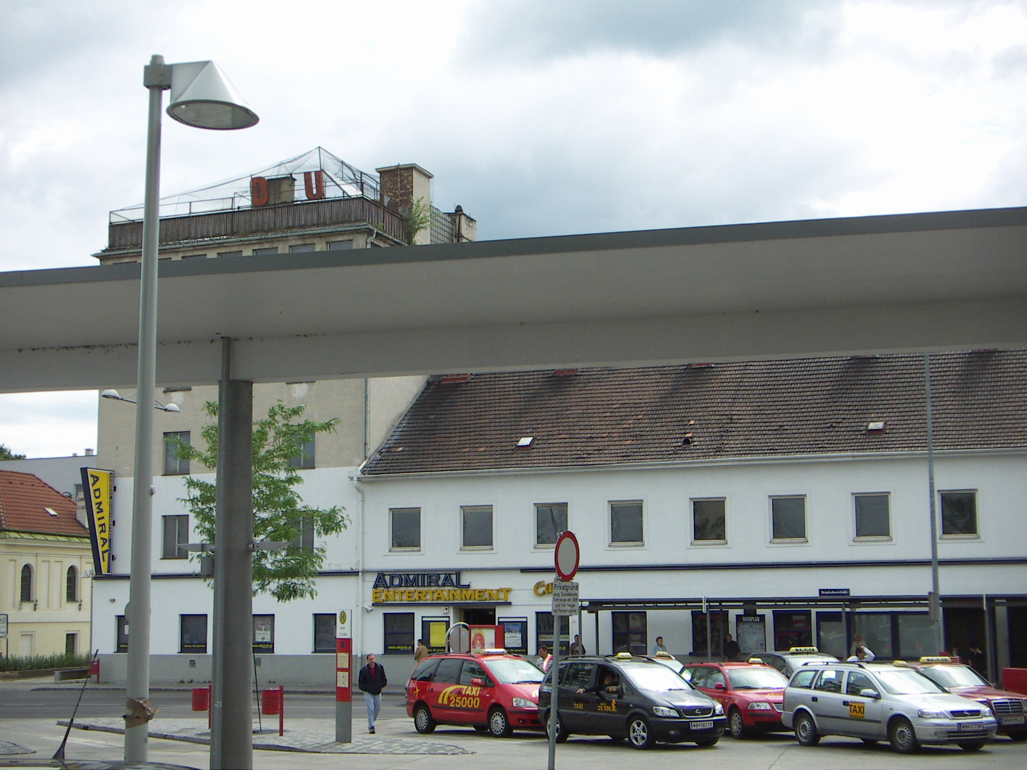 A.E.I.O.U., Schriftzug am Flachdach des Haus, nur noch O. und U. vorhanden, in Wiener Neustadt, vis a vis Wiener Neustadt Hauptbahnhof, Heimkehrerstraße, wo die heimkehrenden Kriegsgefangenen des II. Weltkrieges mit A.E.I.O.U. begrüßt wurden